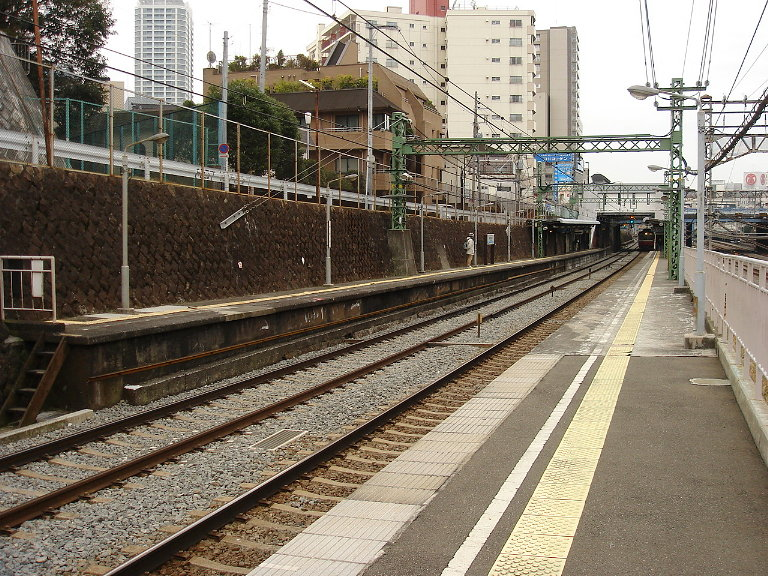 京急本線ja:神奈川駅ホーム 投稿者↑PON（ウエポン）が2007年1月2日に撮影 一部編集の上で2007年2月1日にアップロード